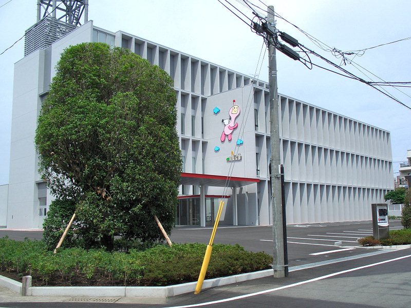 熊本朝日放送 社屋 撮影者/著者/著作権保有者 : MK Products (本人がアップロード) 撮影日 : 2006/10/18 熊本朝日放送用にアップロードした画像です。良い画像があれば別の画像に変えてください。